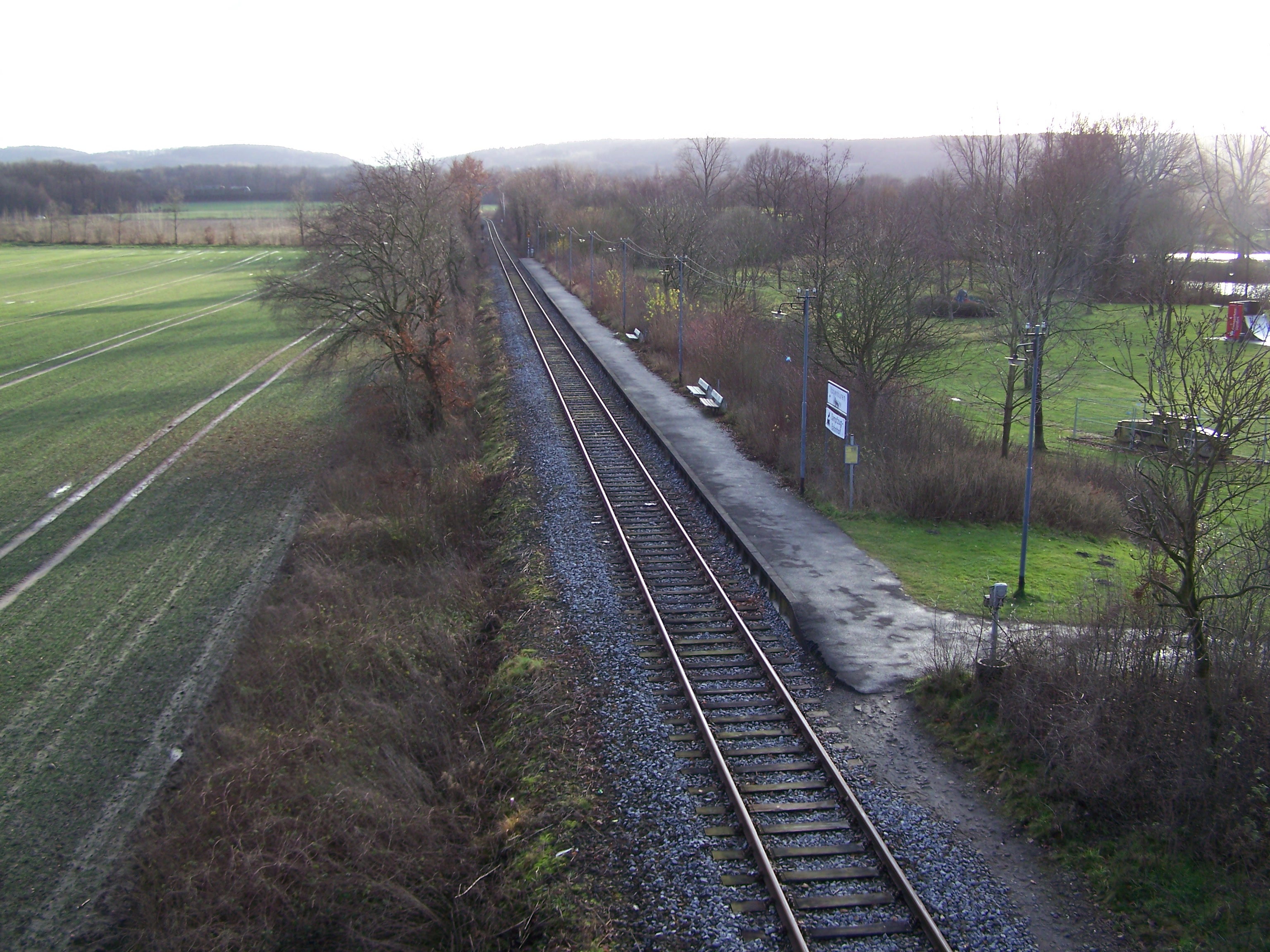 Bahnhof Ibbenbüren Aasee, hinten rechts der Aasee